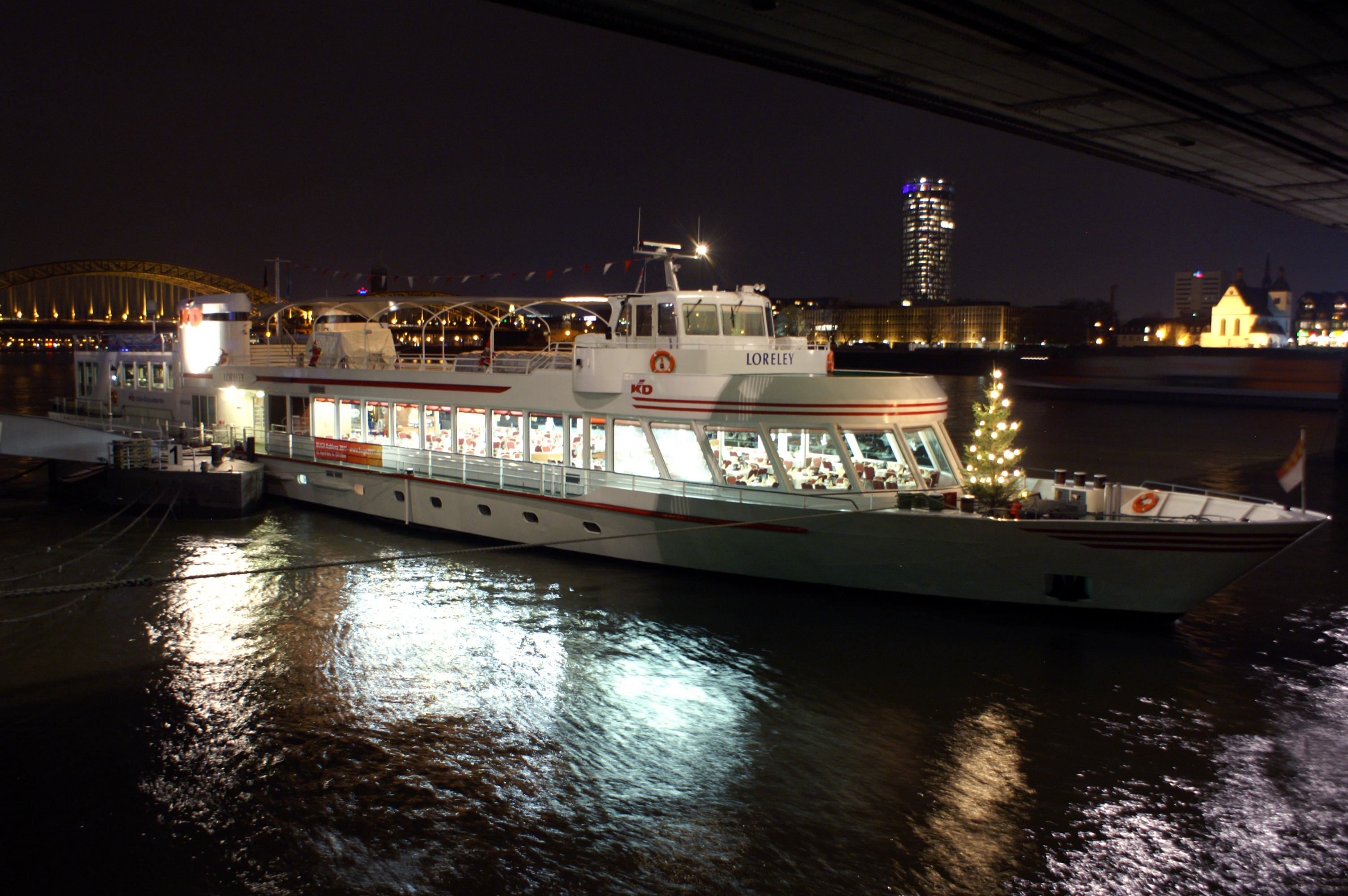 Nachtaufnahme der MS Loreley am Anleger Köln.